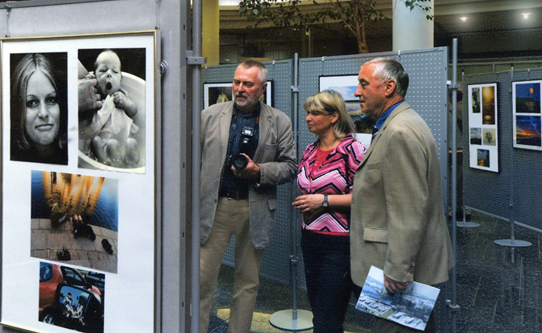 Ausstellung „60 Jahre Freiberger Fotofreunde“, 2010. Fotograf: Wolfgang Thieme.